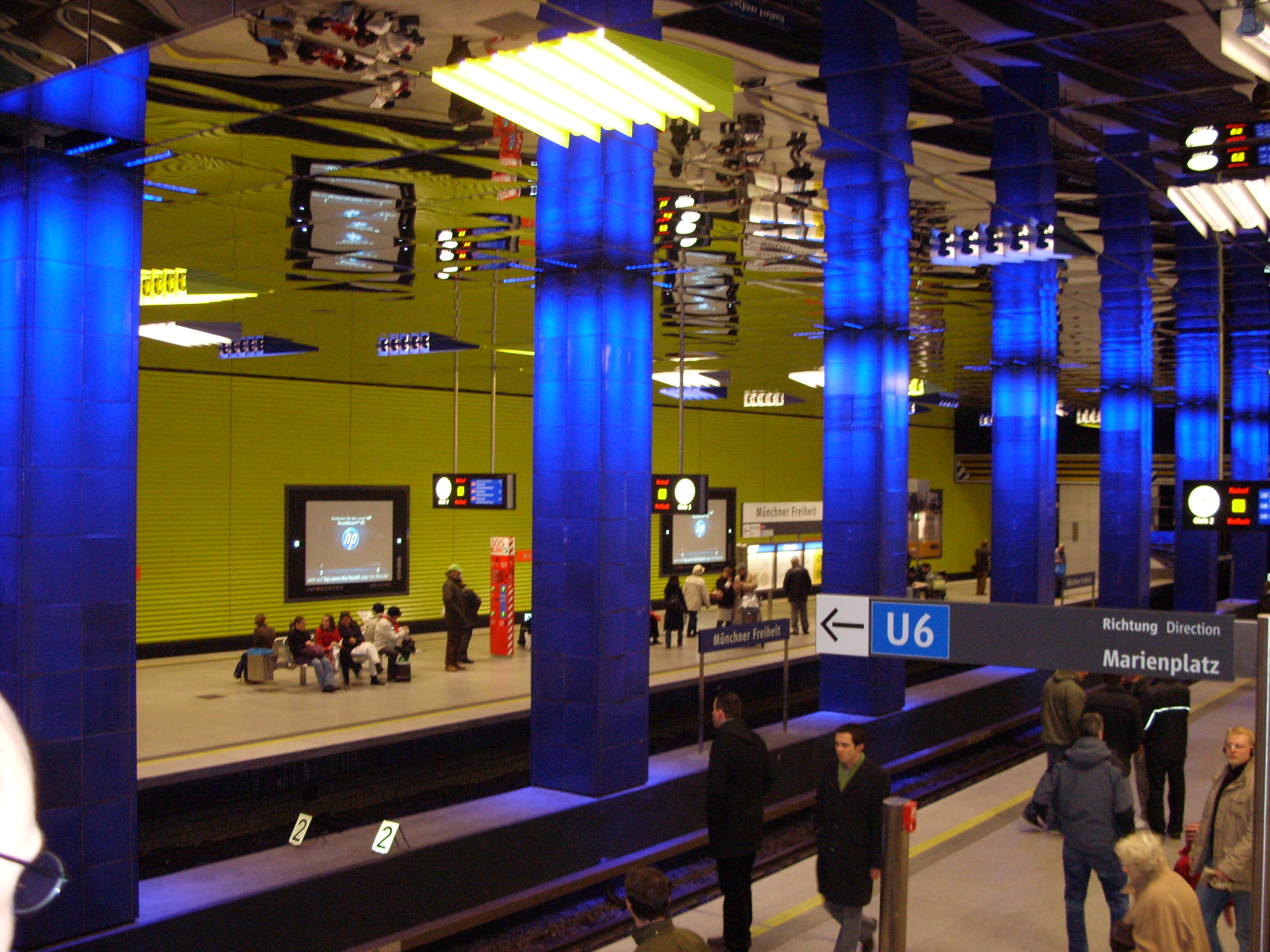 U-Bahnhaltestelle: Muenchner Freiheit nach Renovierung 2009